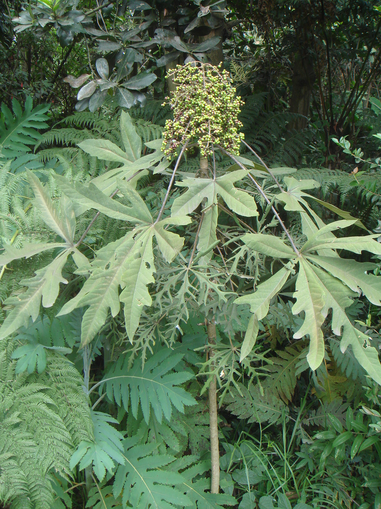 Mano de oso (Oreopanax floribundus sinónimo de Oreopanax incisus), Jardín Botánico de Bogotá, Colombia.